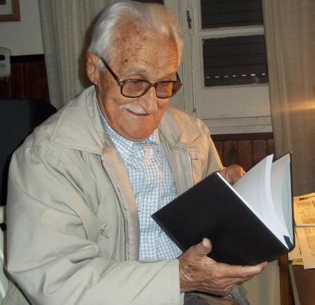 El poeta Aledo Luis Meloni leyendo un libro.